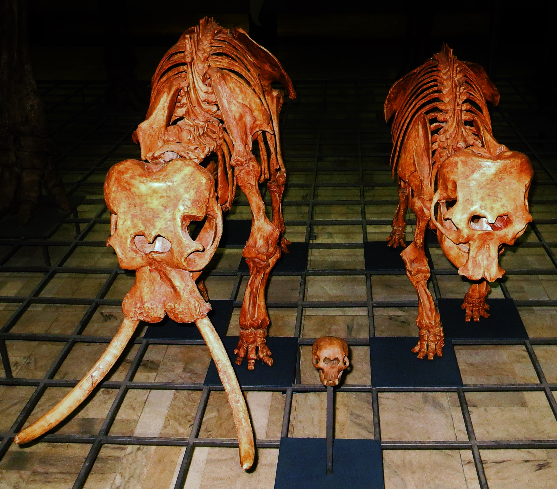 Took the picture at Senckenberg Museum, Frankfurt